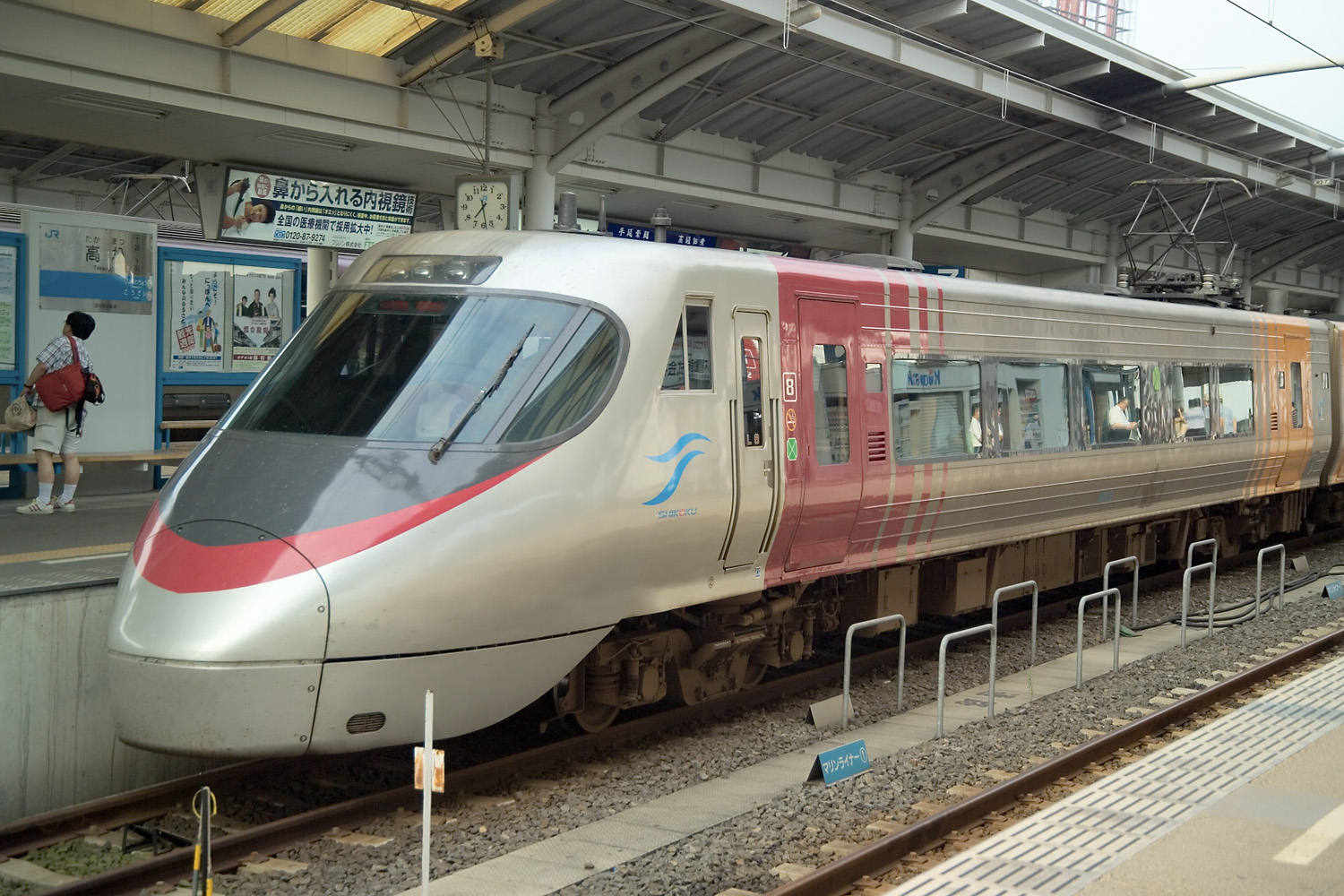 Shikoku Railway Company (JR Shikoku) train at Takamatsu Station, Kagawa Prefecture, Japan